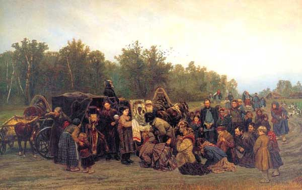 К. А. Савицкий. Встреча иконы. 1878. Холст, масло. 144 × 230 см. Инв. 591. Третьяковская галерея, Москва, Россия.